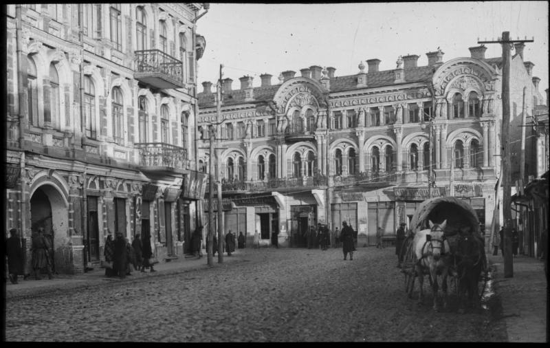 Перетин вулиць Ковельської та Лесі Українки. Будинок зліва не зберігся. Прямо - медколедж зі зміненим фасадом